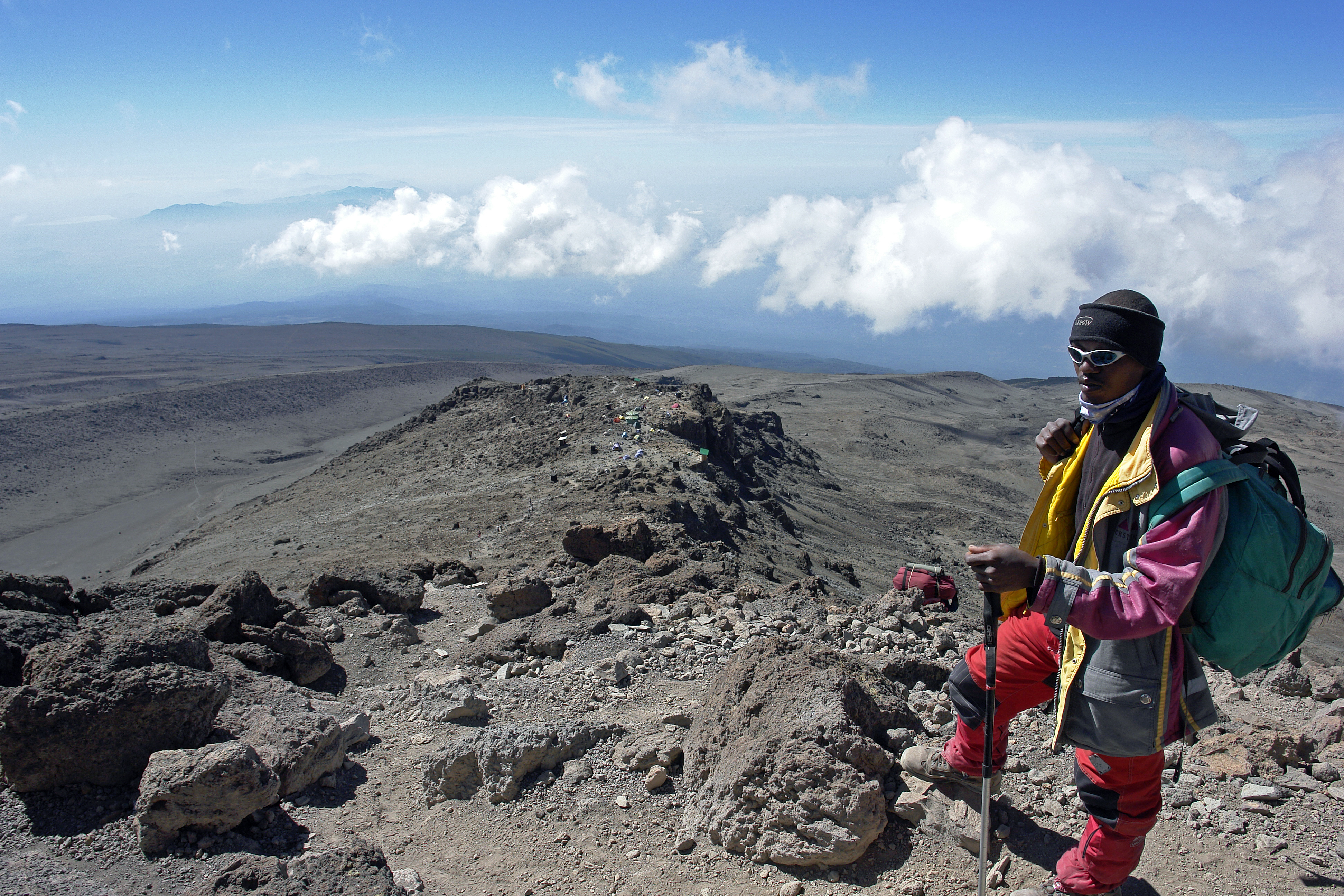 Beim Abstieg Blick auf das Barfu-Camp; Höhe ca.5.000m über NN